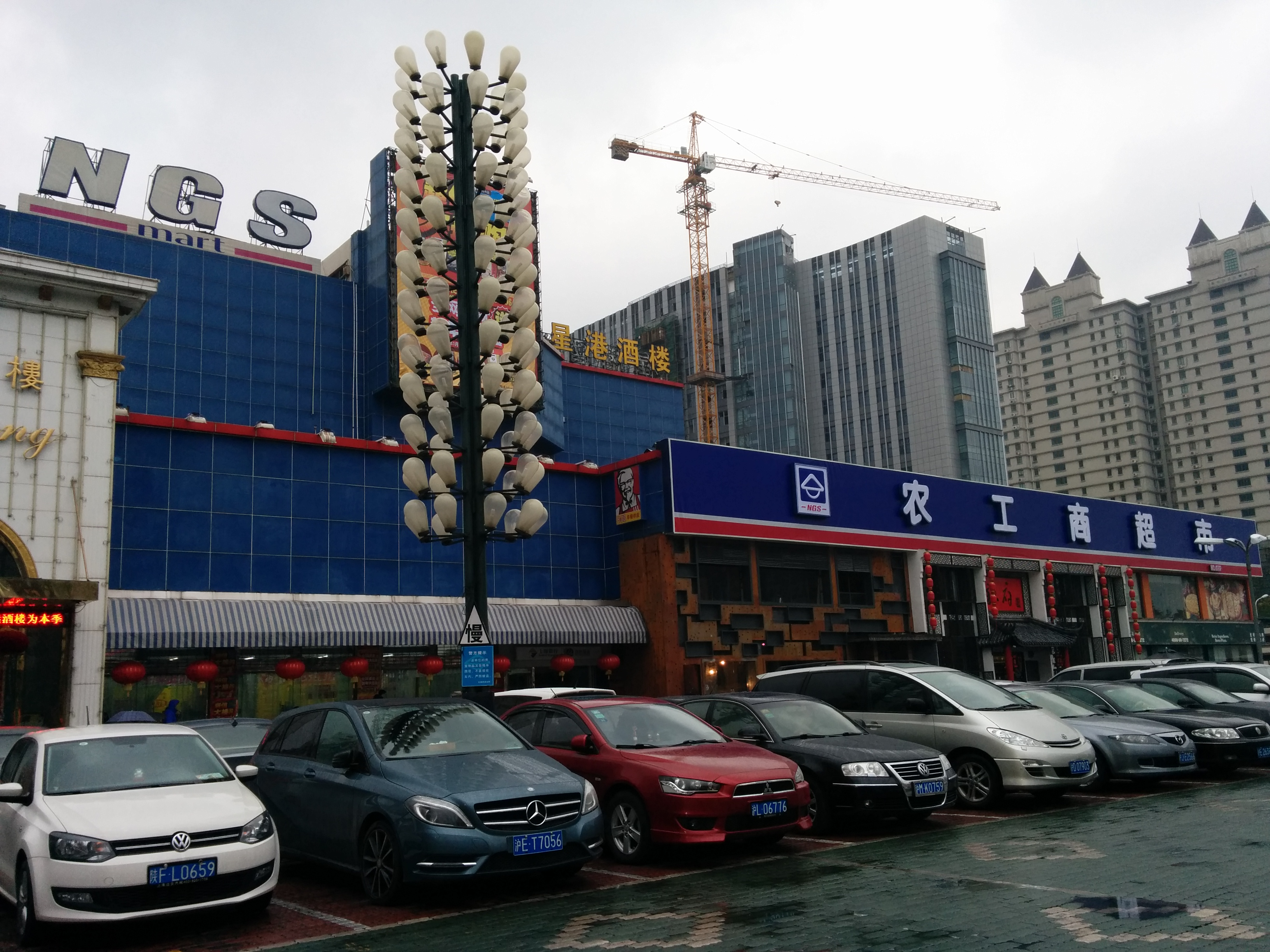 中文（中国大陆）: 一家位于上海打浦路的农工商超市